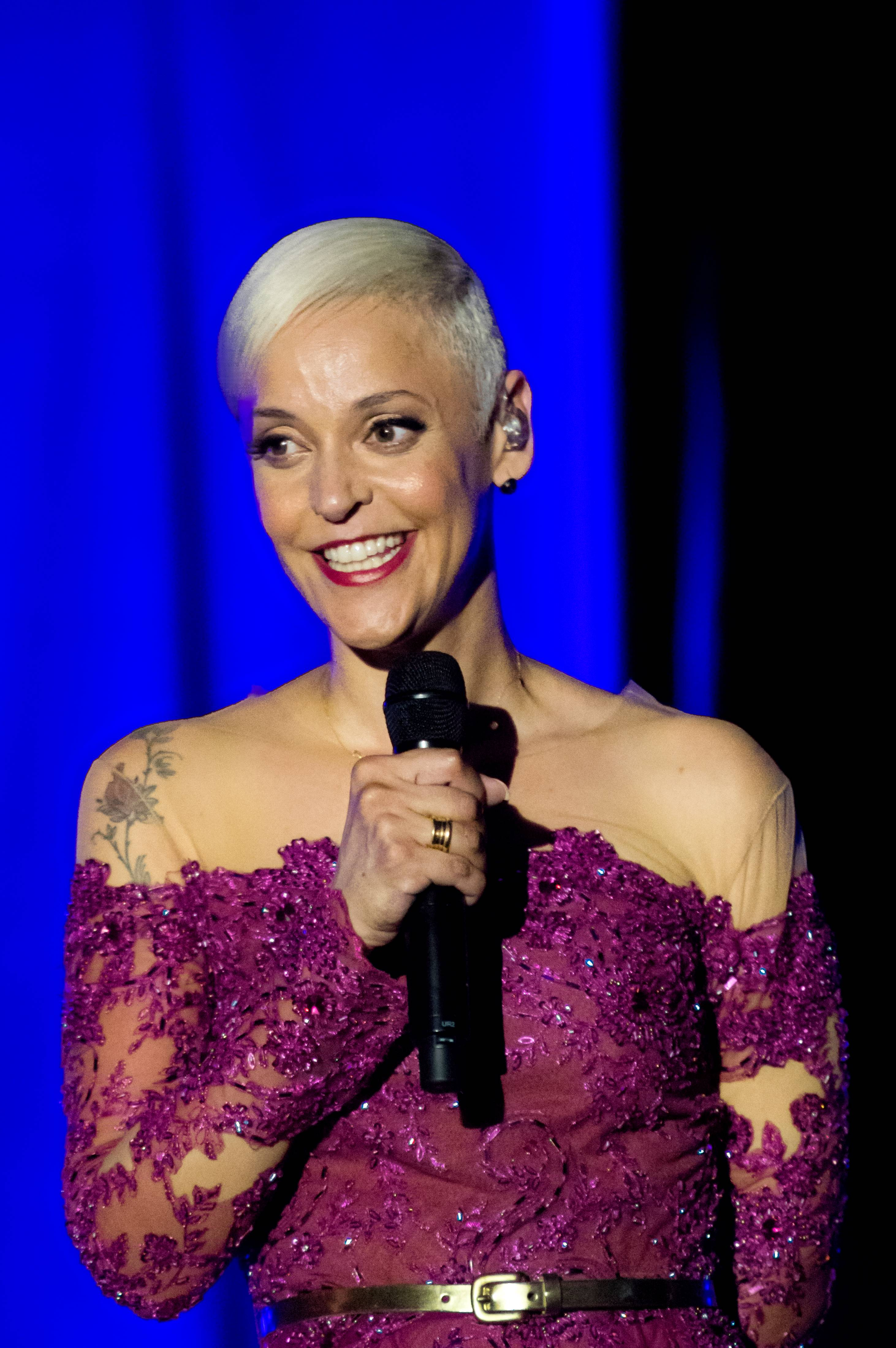 Bilder vom ZMF 2015 Mariza